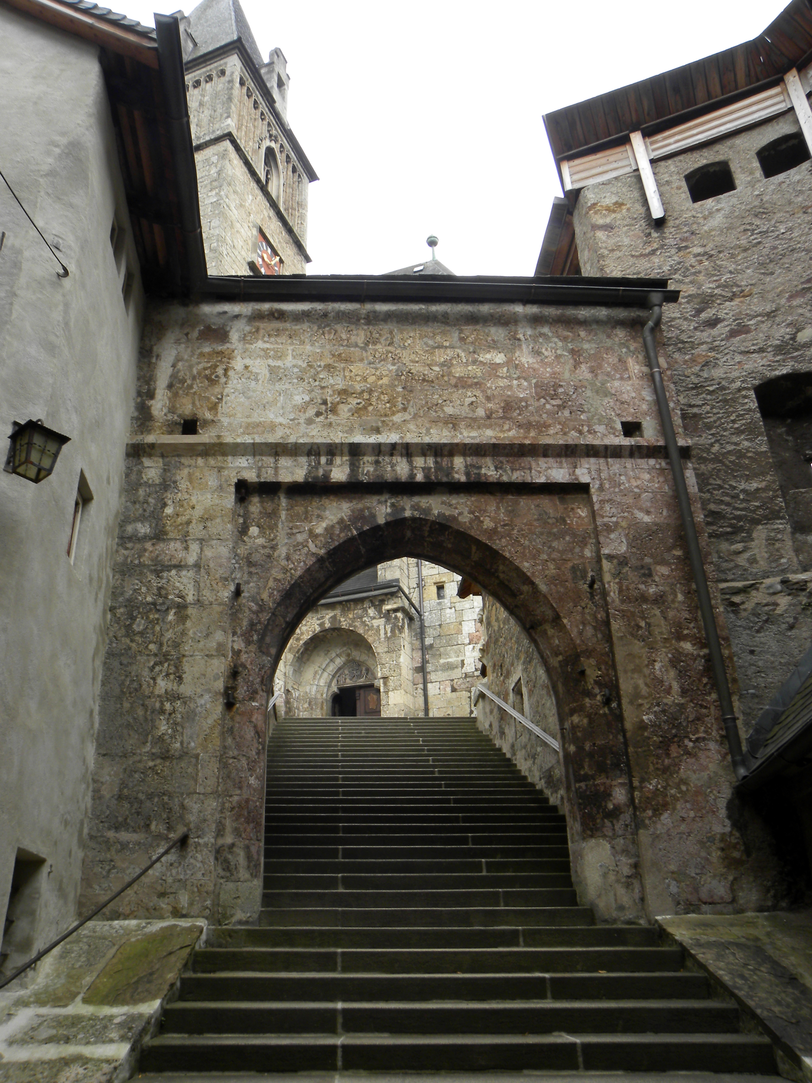 Kirchenfestungsanlage hl. Oswald - Aufgang